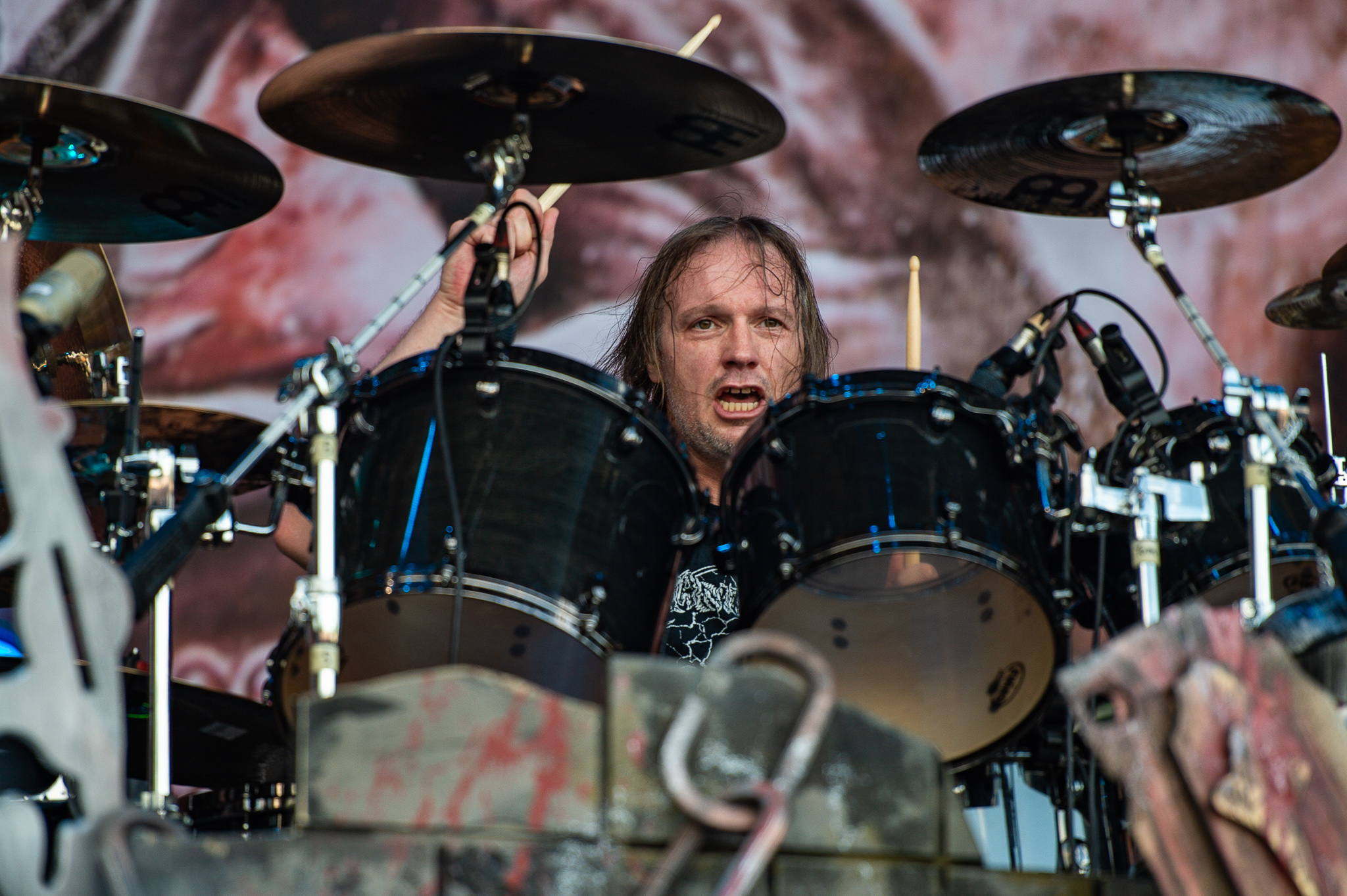 ARGO-Konzerte,Beck's Park Stage,Festival,Jürgen „Ventor“ Reil,Konzert,Kreator,Livekonzert,Livemusik,Musik,RiP,Rock im Park 2018